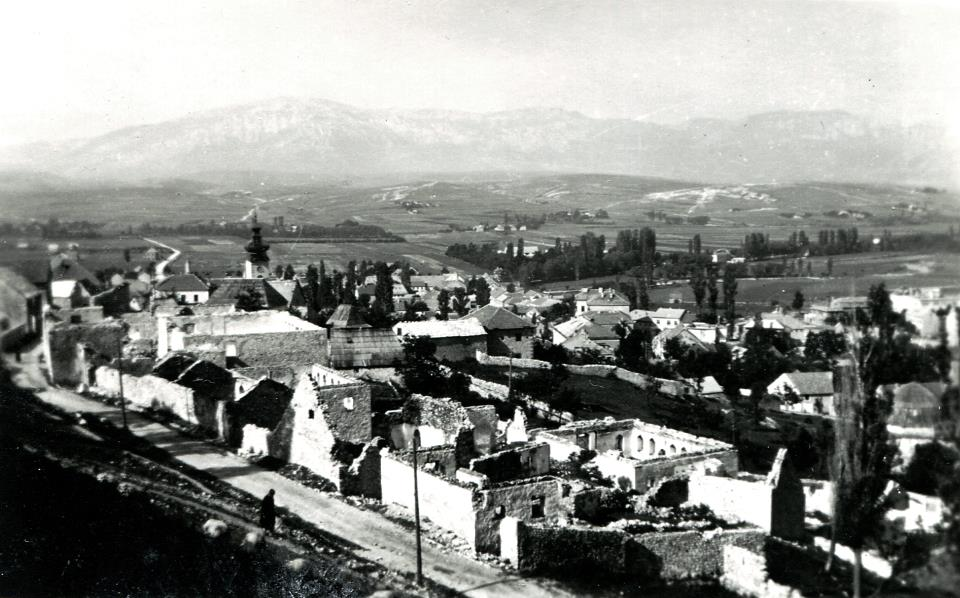 Porušene kuće u Korenici nakon operacije Weiss zbog djelovanja Zrakoplovstva NDH i Luftwaffea